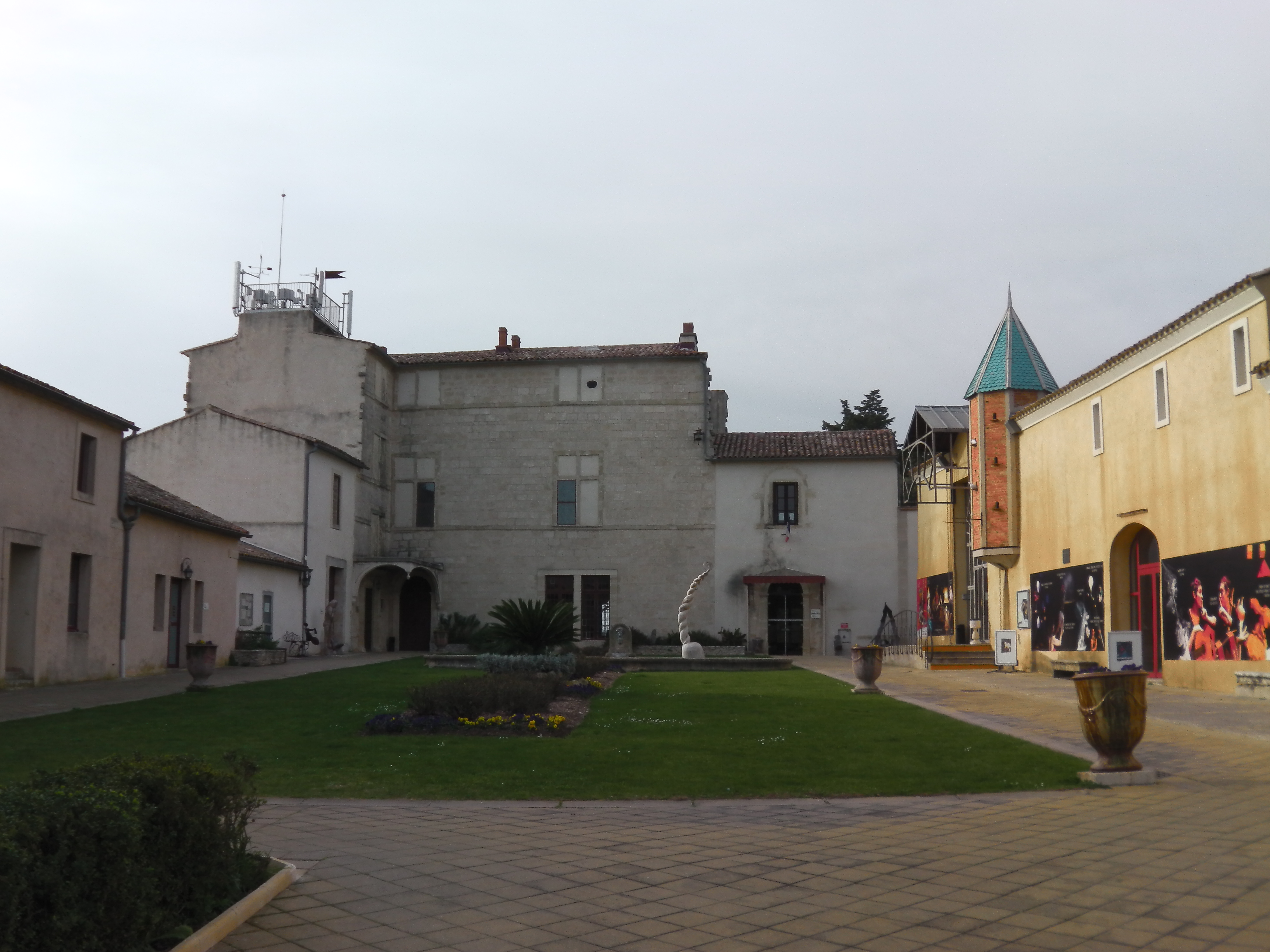 Le château du Terral (Saint-Jean-de-Védas, Hérault)